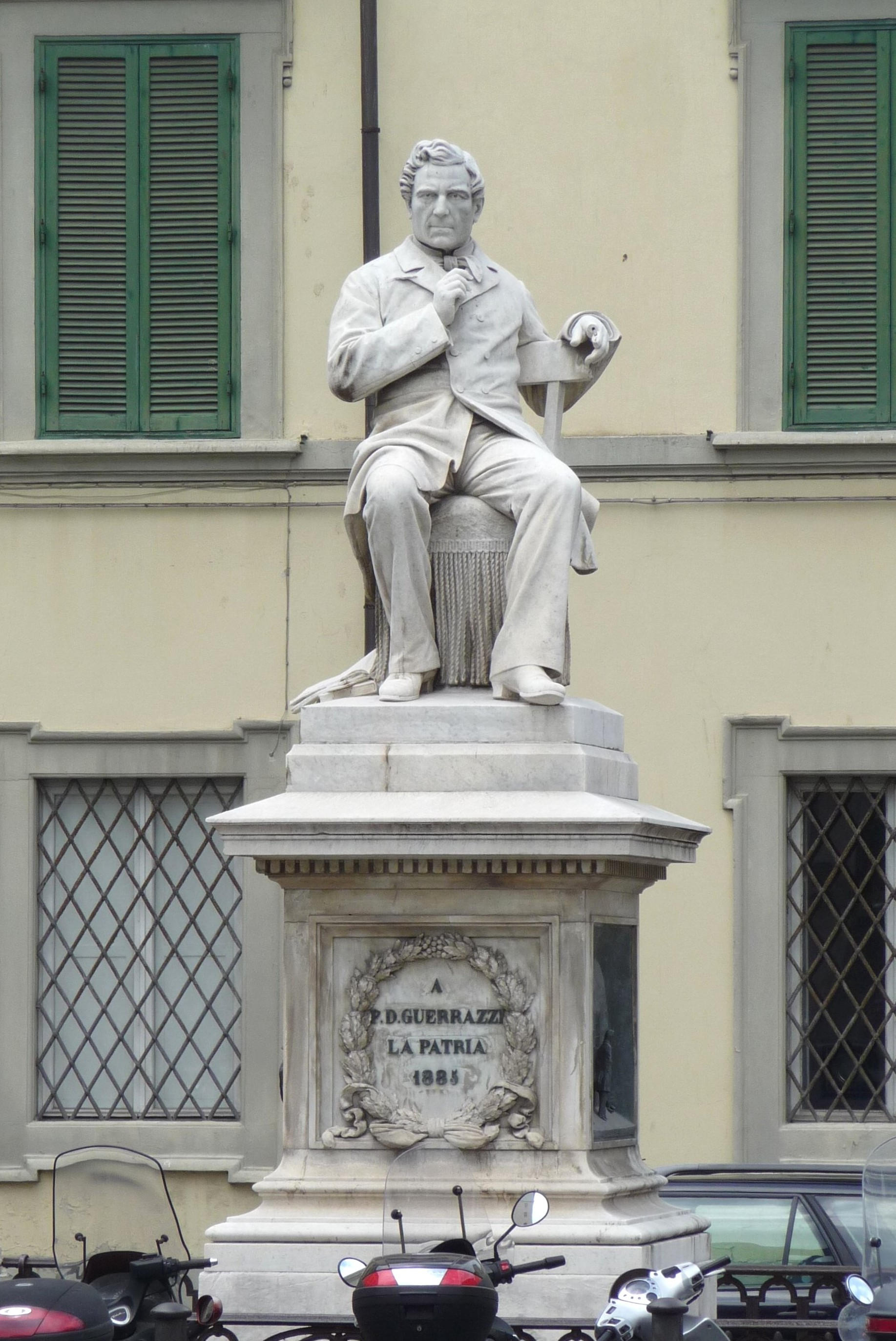 Monument for Francesco Domenico Guerrazzi, Piazza Guerrazzi, Livorno, Italy